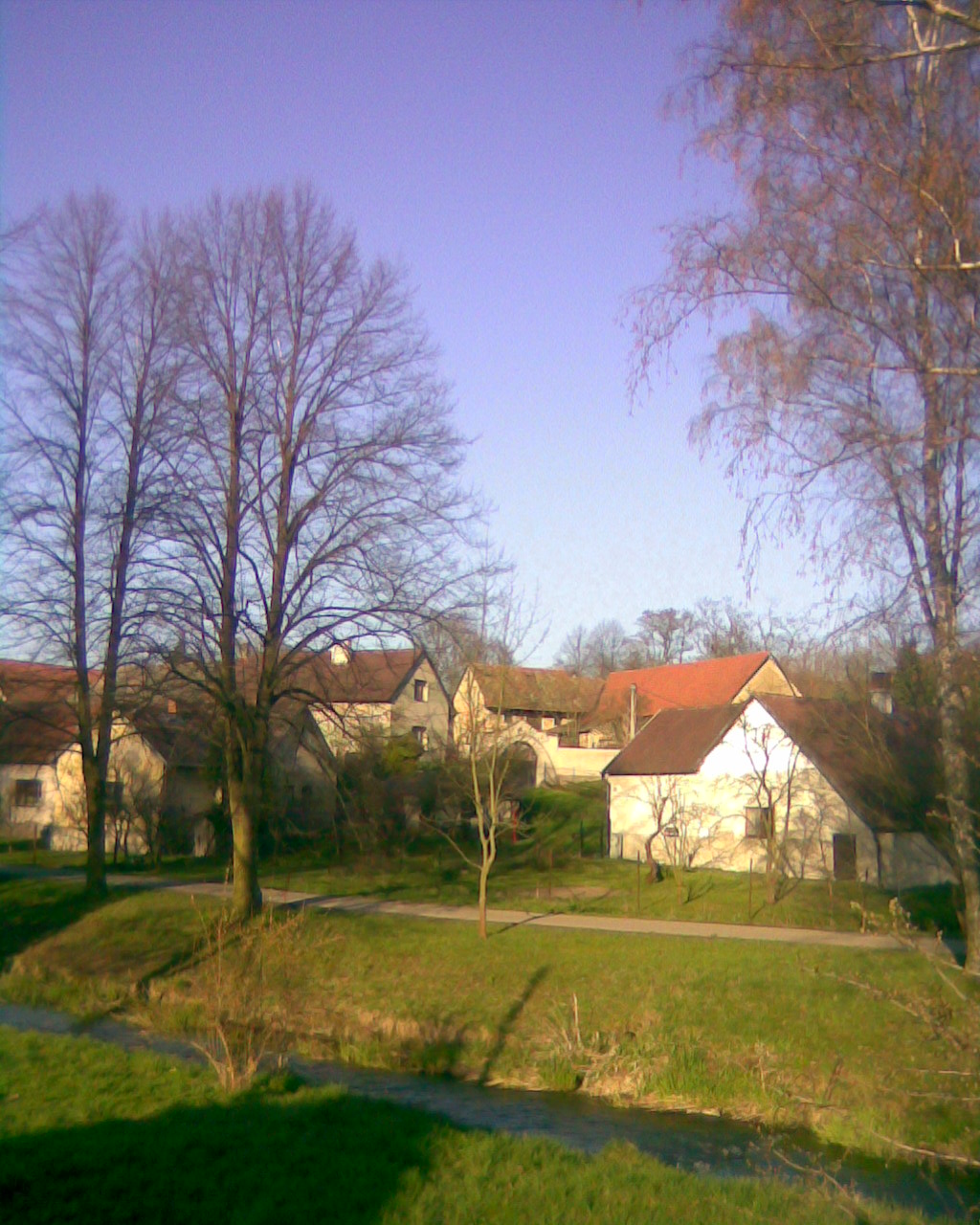 Zřejmě původní jádro obce